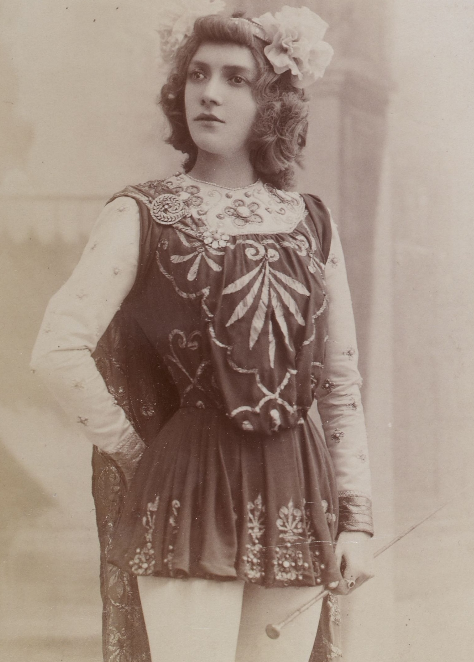 Album Reutlinger de portraits divers, vol. 2. Ève Lavallière dans "La Belle Hélène".